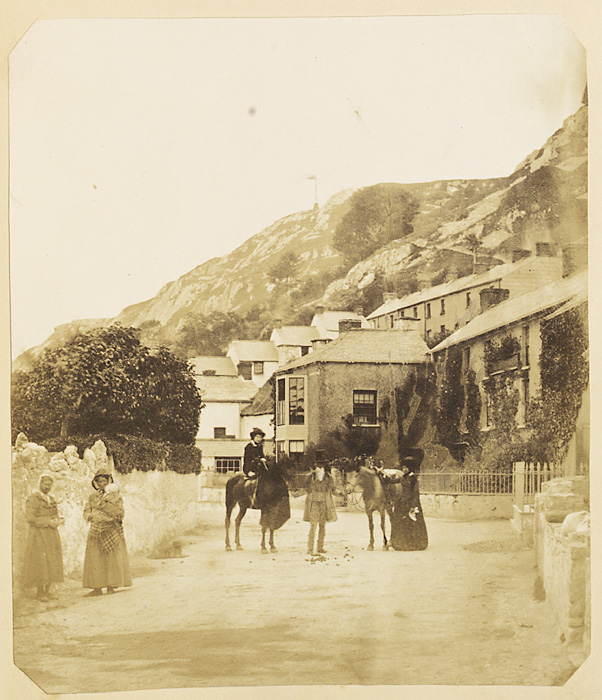 Teitl Cymraeg/Welsh title: Y Mwmbwls Ffotograffydd/Photographer: Probably Mary Dillwyn (1816-1906) Dyddiad/Date: 185- Cyfeiriad/Reference: vin00131 (pb02377/077) Rhif cofnod / Record no.: 3590002 Rhagor o wybodaeth am Ffotograffiaeth Gynnar Abertawe yn Llyfrgell Genedlaethol Cymru More information about Early Swansea Photography at the National Library of Wales